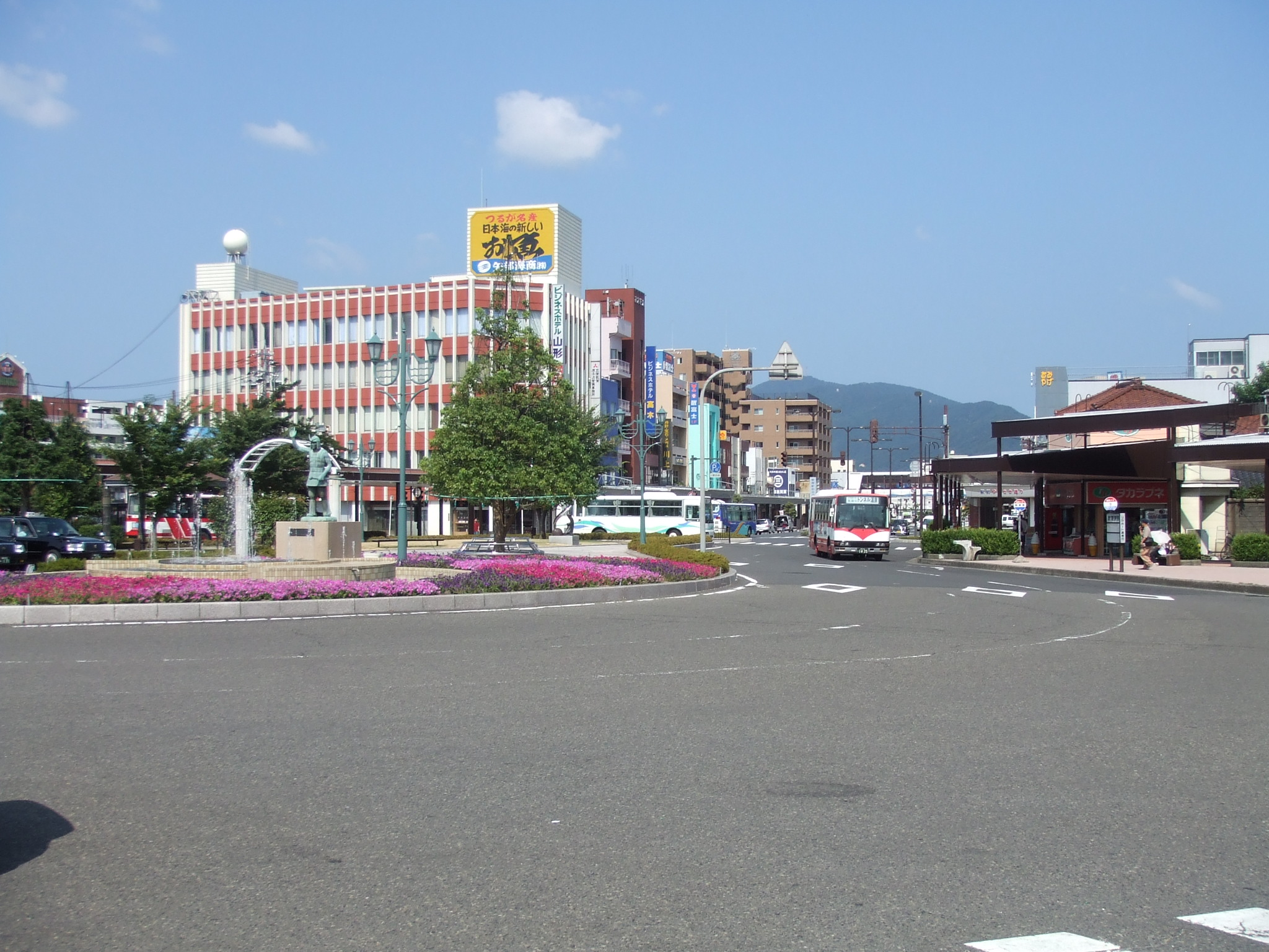 敦賀駅 駅前の様子